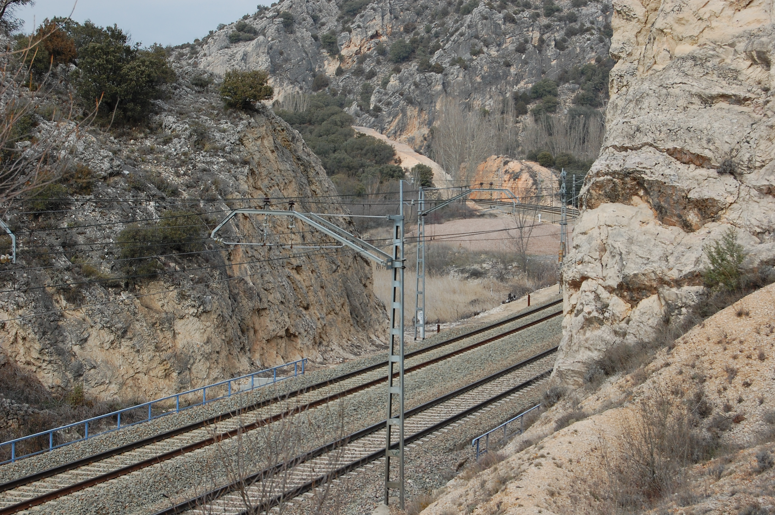 Via del tren